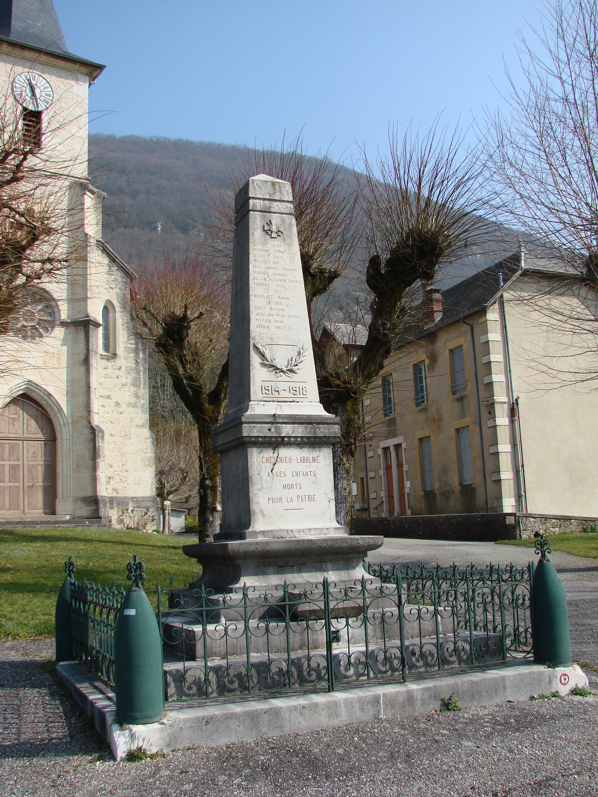 Monument aux mort de Cheignieu-la-Balme